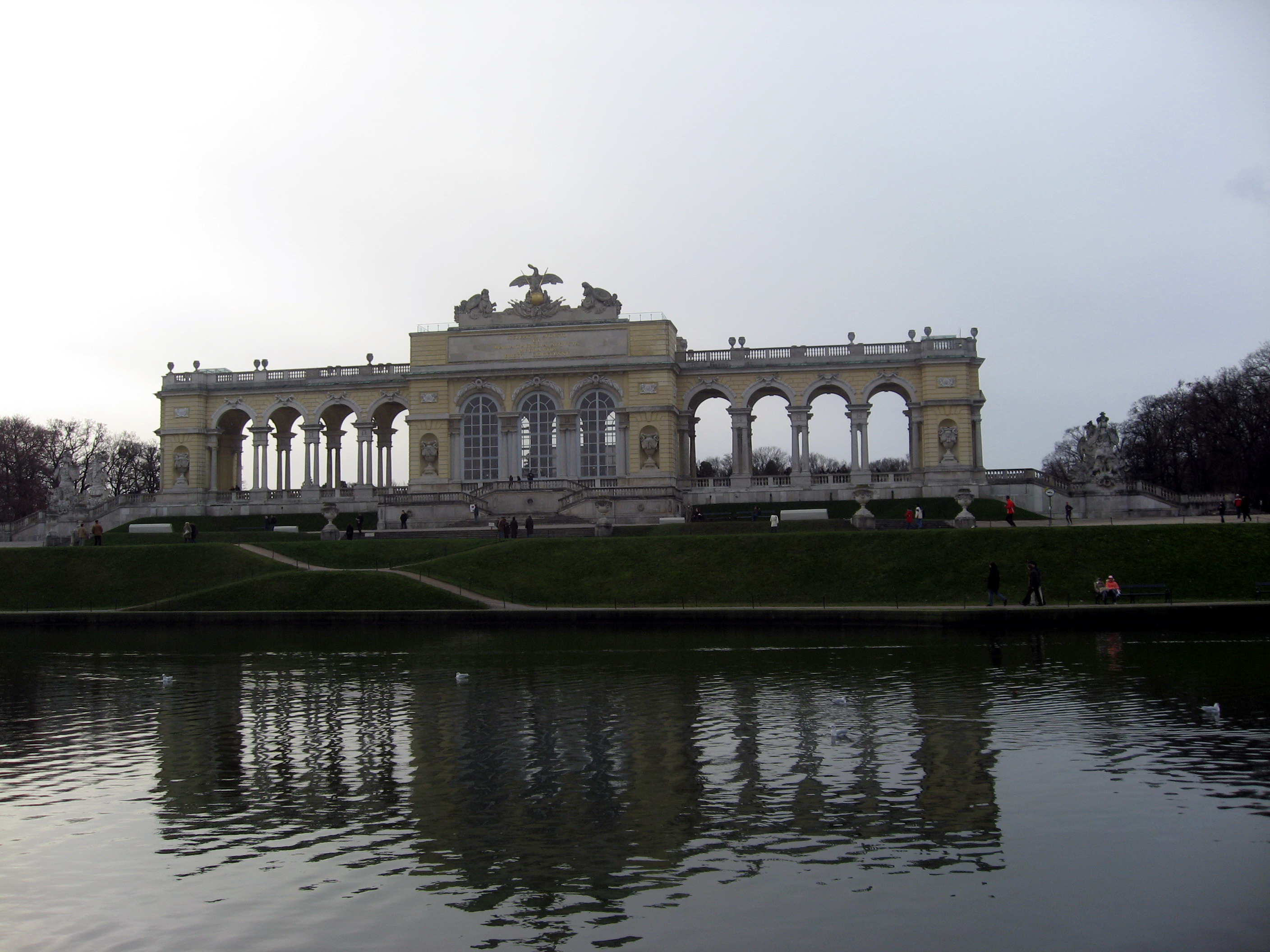 Schönbrunn